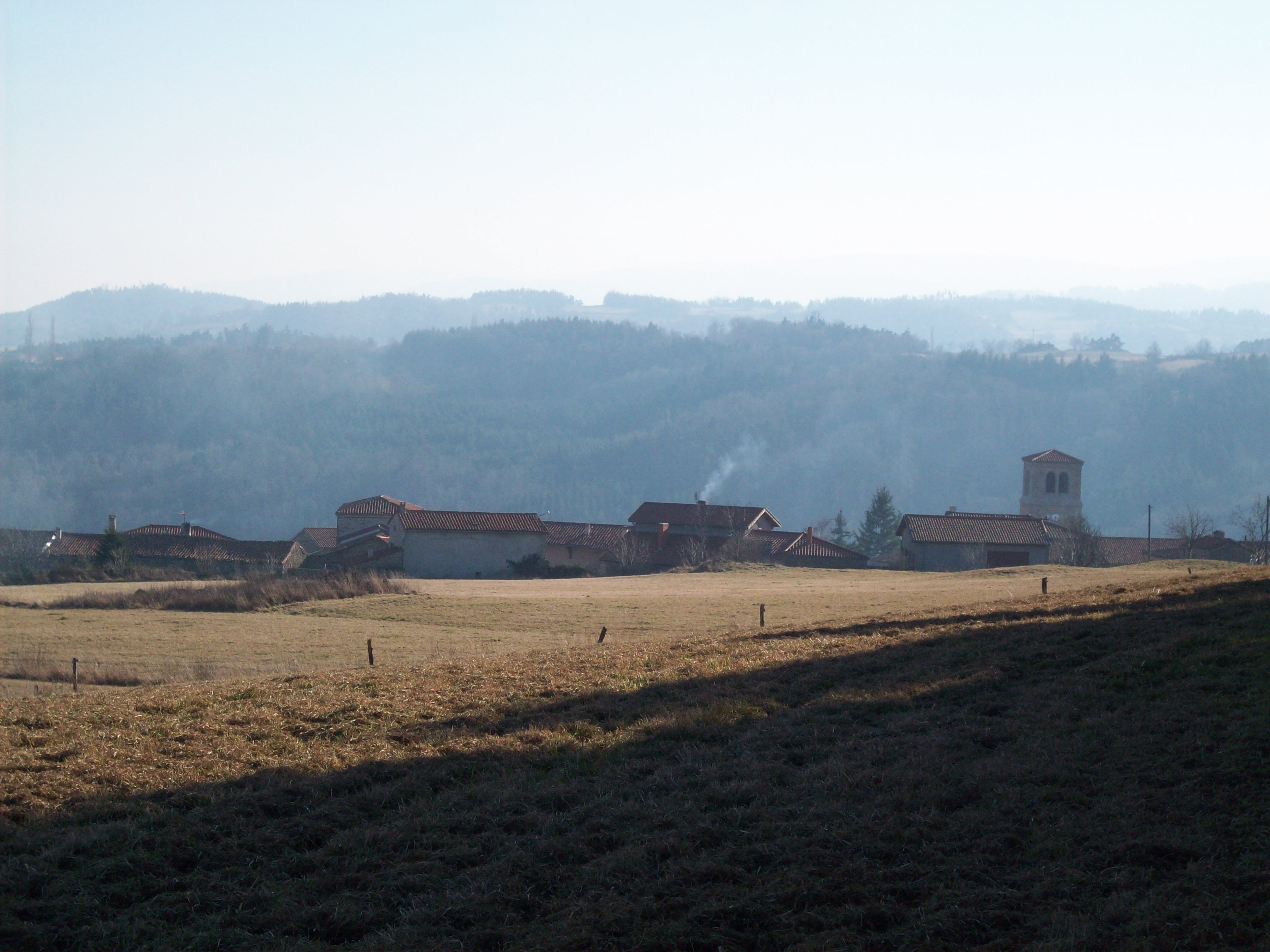 Village de Bard (Loire)